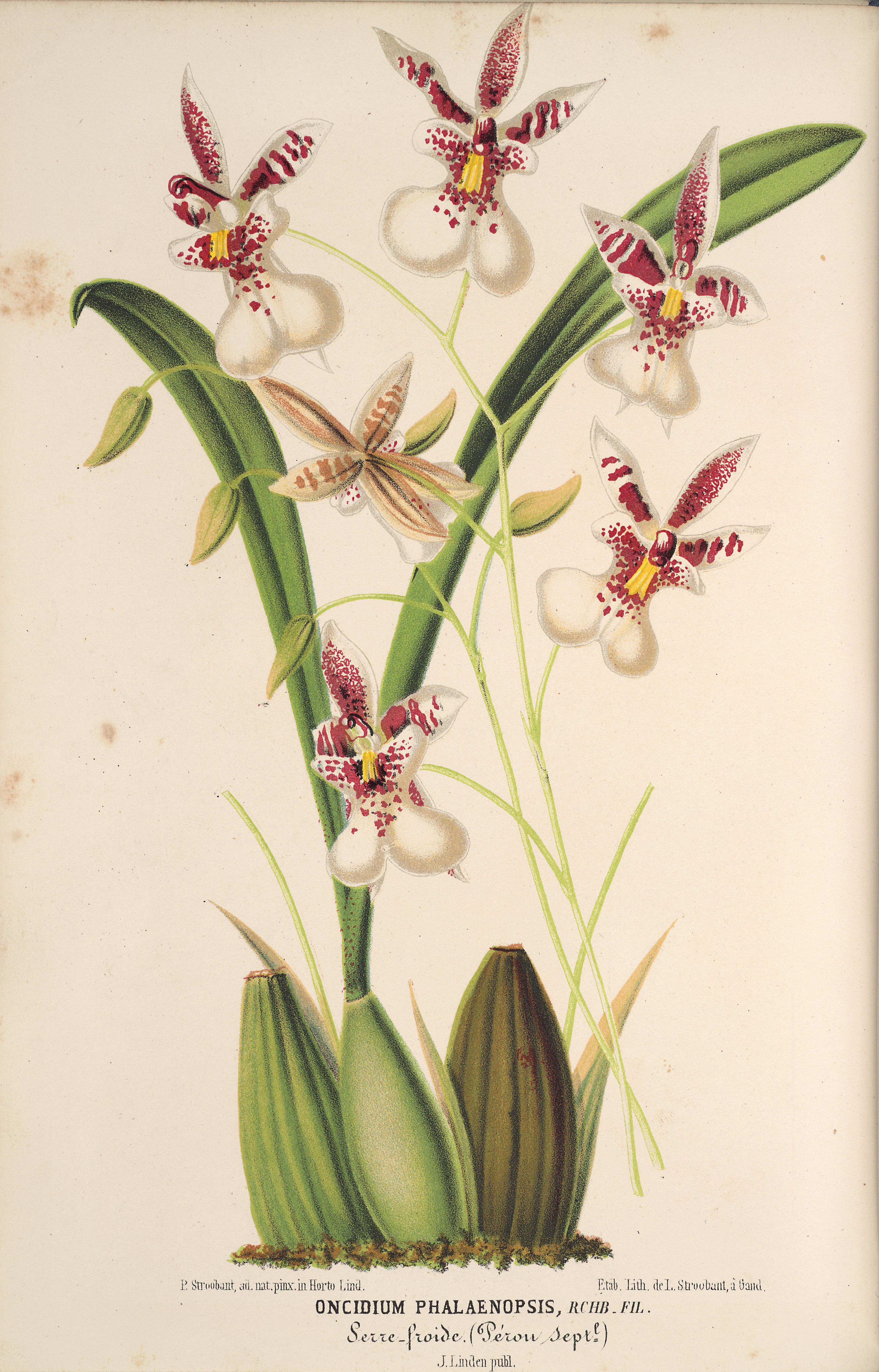 Oncidium phalaenopsis